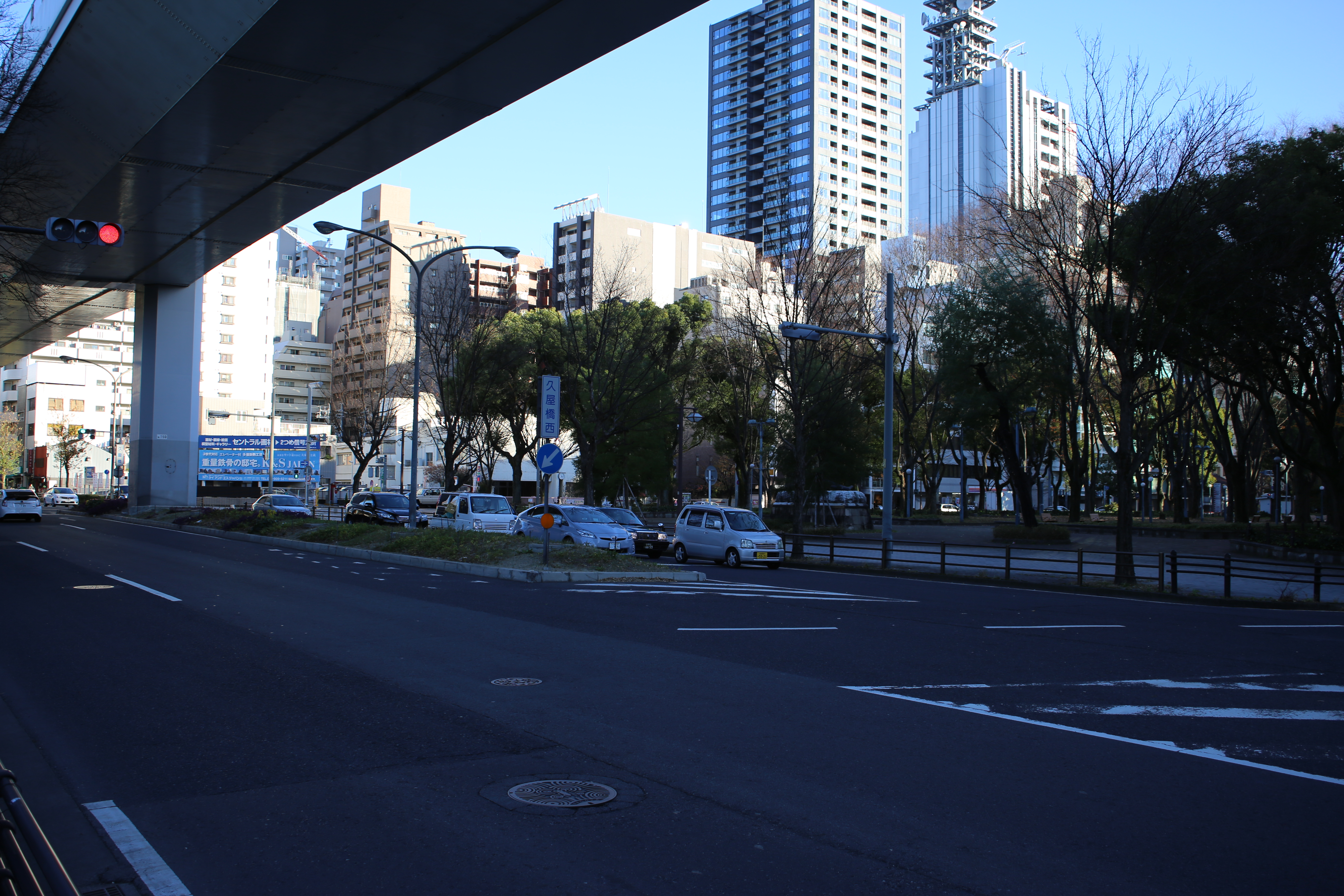 名古屋市中区・東区丸の内三丁目にある久屋大通・外堀通の交点である「久屋橋西」・「久屋橋」交差点を北西側より撮影